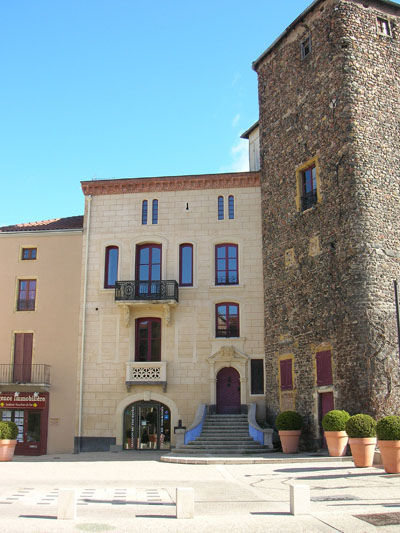 Office de Tourisme de Roanne